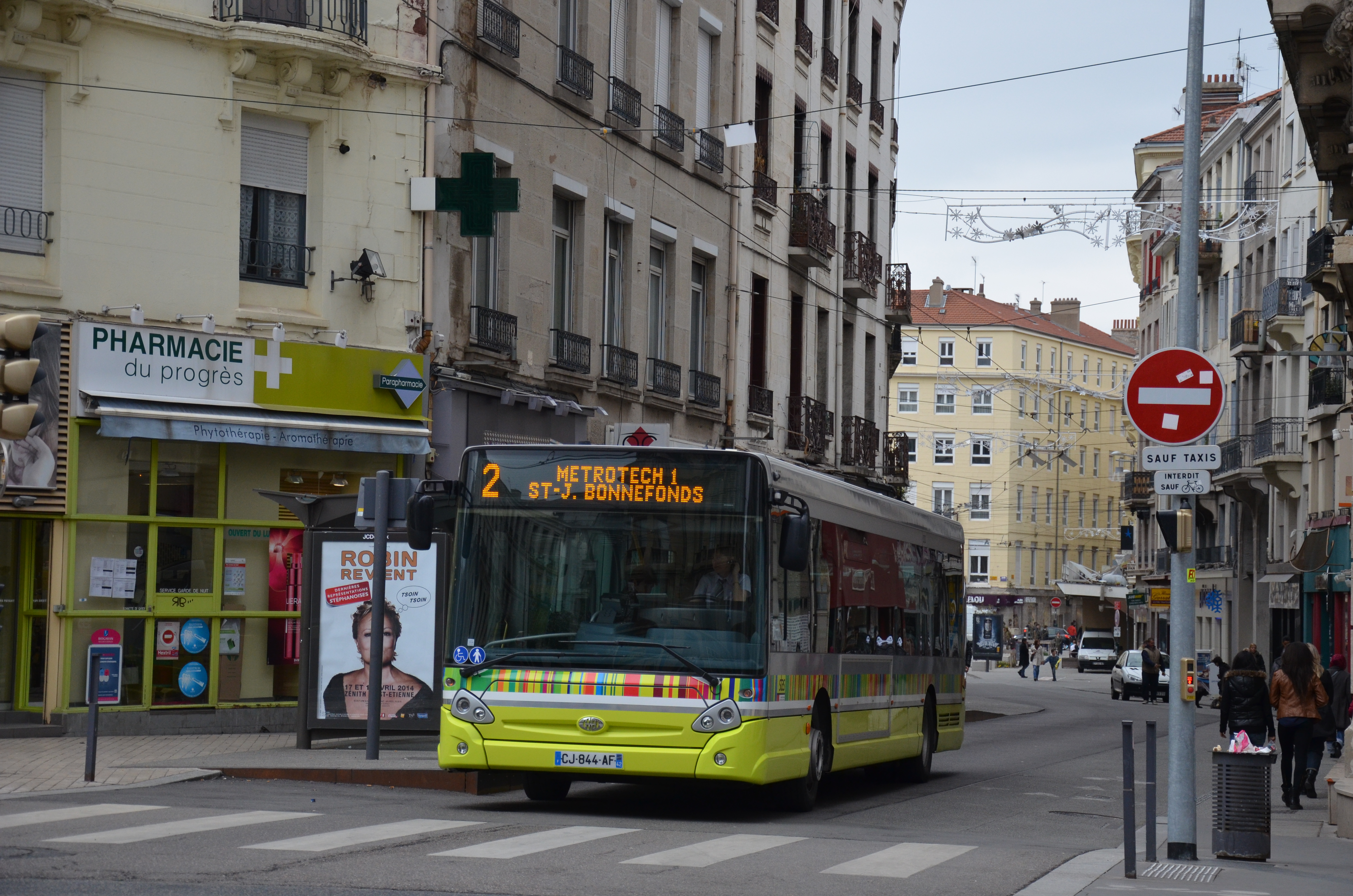 Heuliez GX 327 n°827 quittant l'arrêt Georges Tessier sur la ligne 2 du réseau STAS de Saint-Etienne, en direction de Metrotech 1.